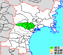 Map of Kurokawa District, Miyagu, Japan